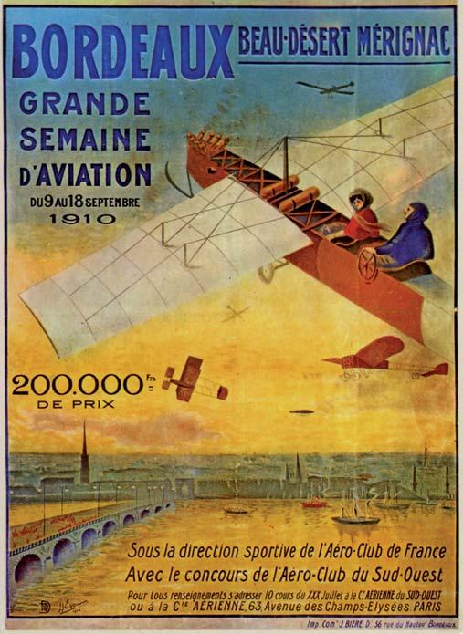 Affiche pour la grande semaine de l'aviation à Mérignac du 9 au 18 septembre 1910